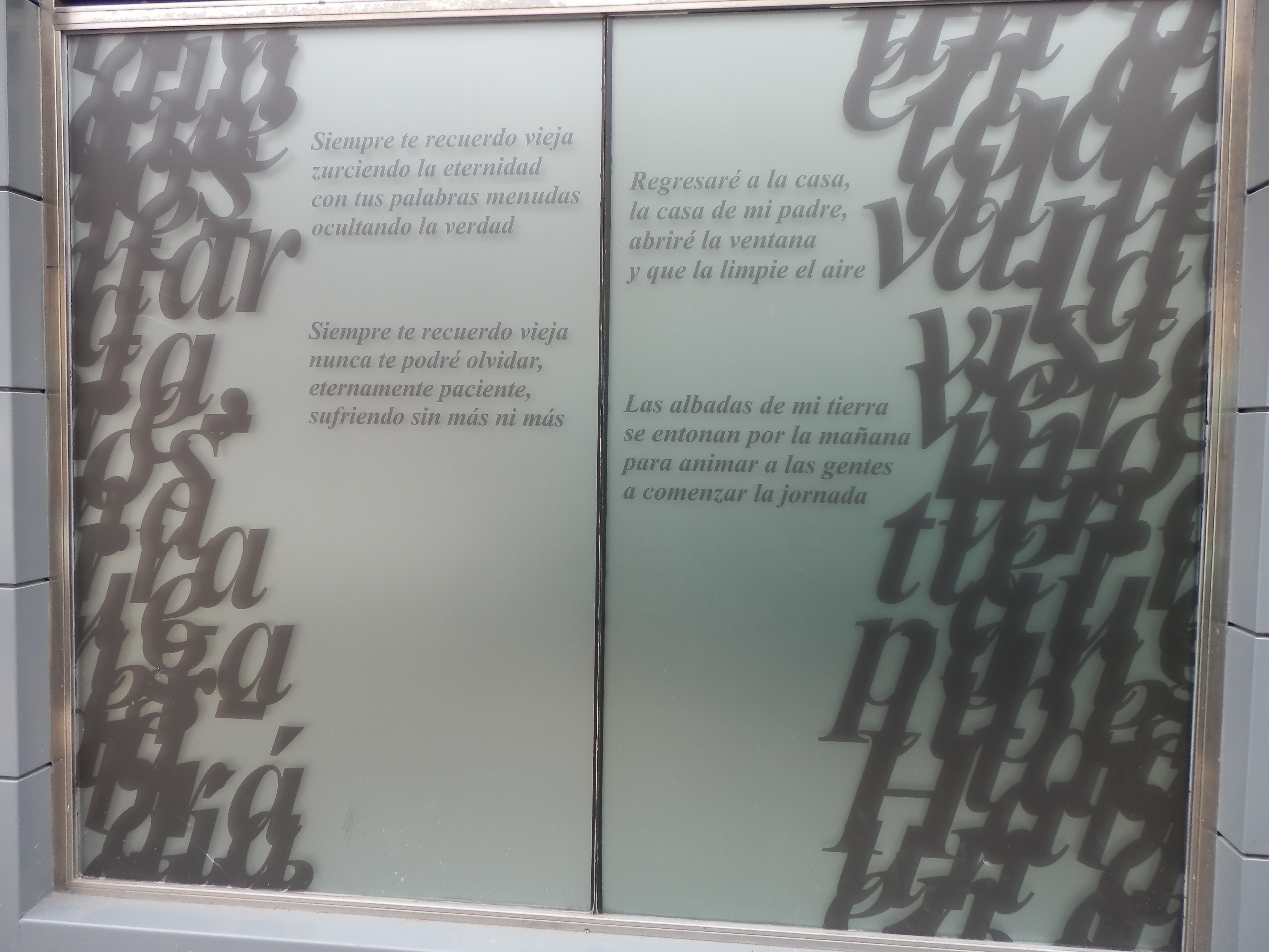 Sede de la Fundación José Antonio Labordeta en Zaragoza.